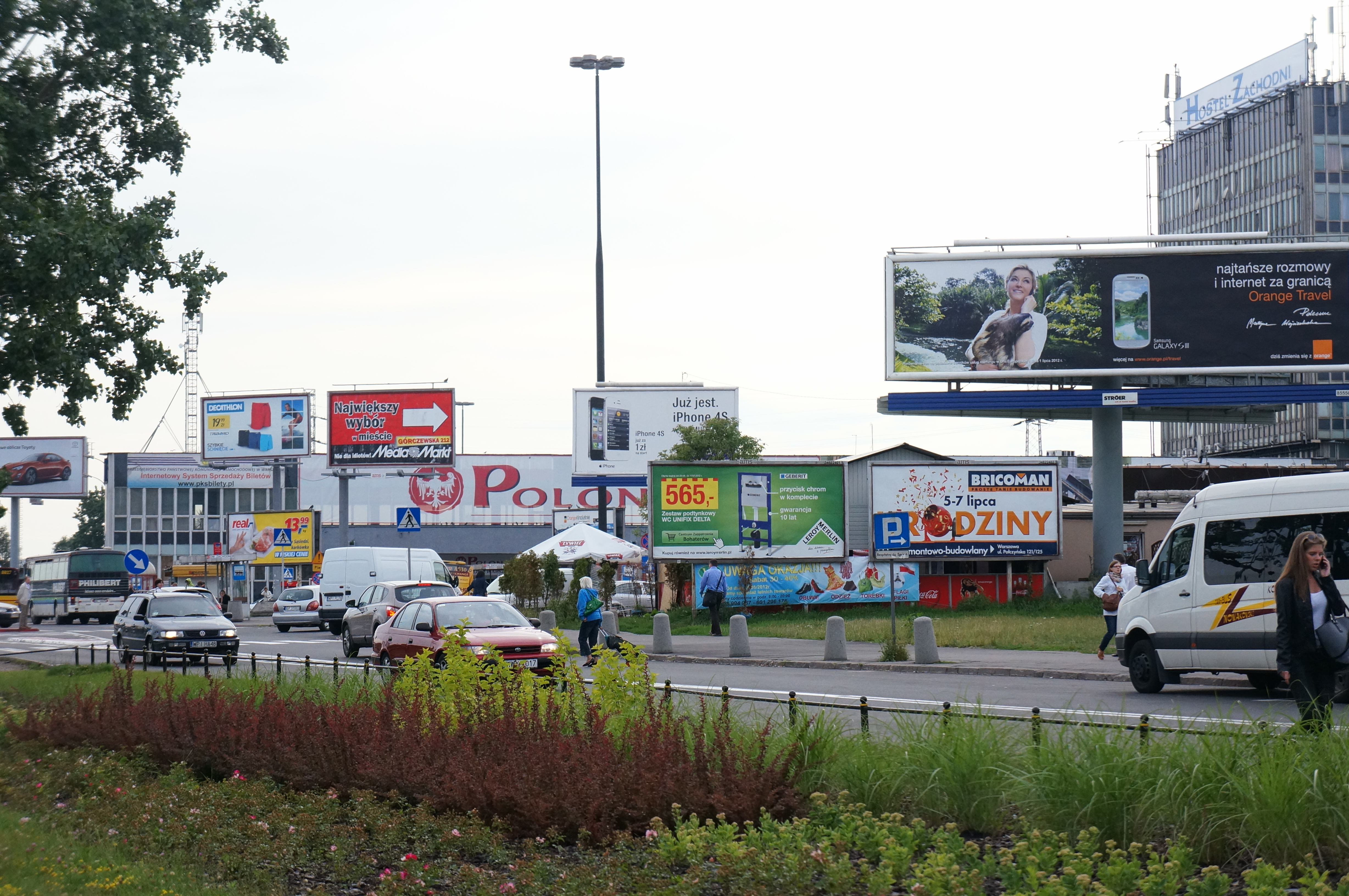 reklama zewnętrzna, outdoor, chaos, zanieczyszczenie wizualne, przestrzeń publiczna, reklama